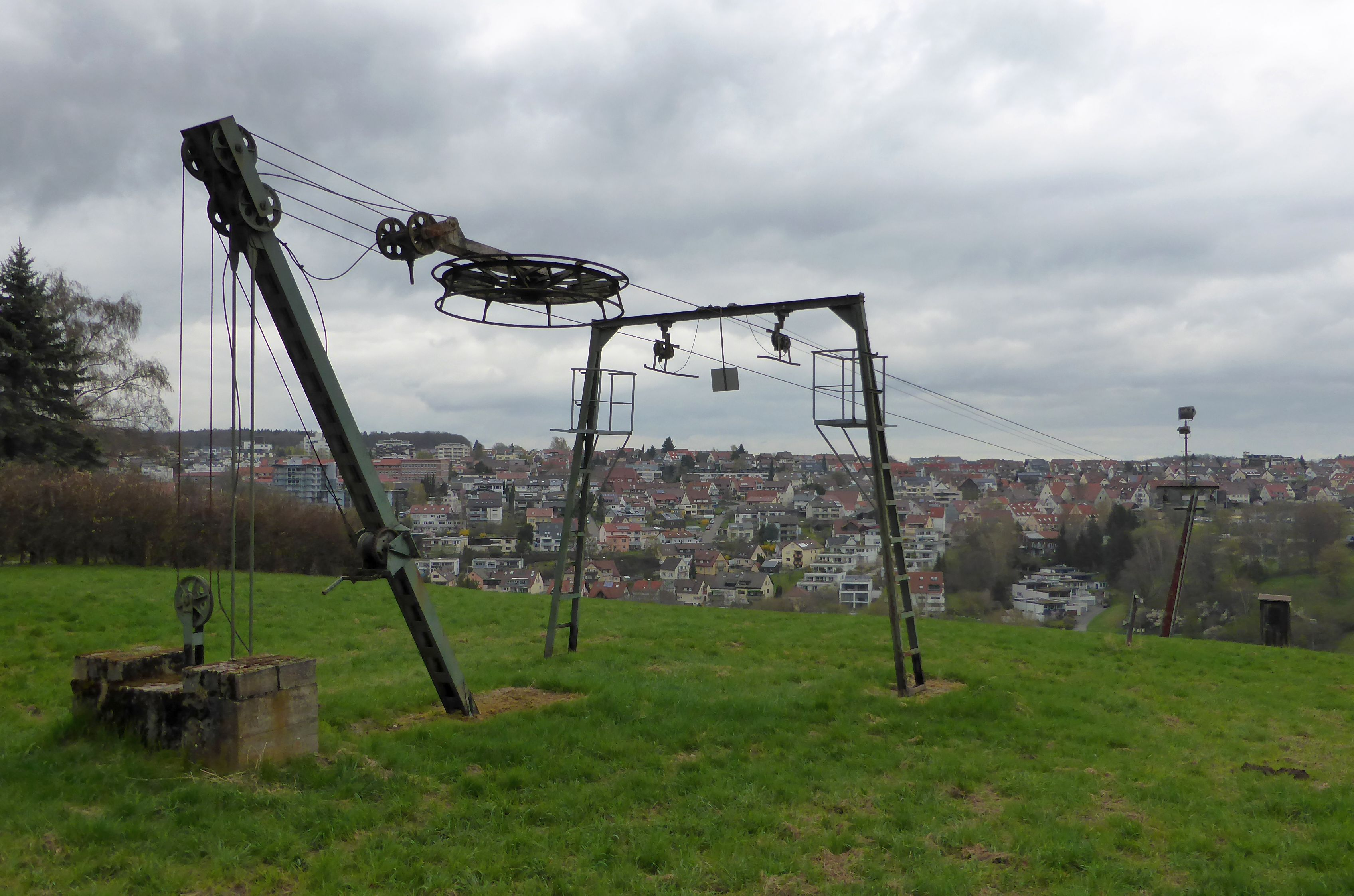 De restanten van de Piz Mus skilift op de helling van de Hauberg bij Musberg in het Siebenmühlental